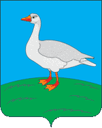 Герб Уржума